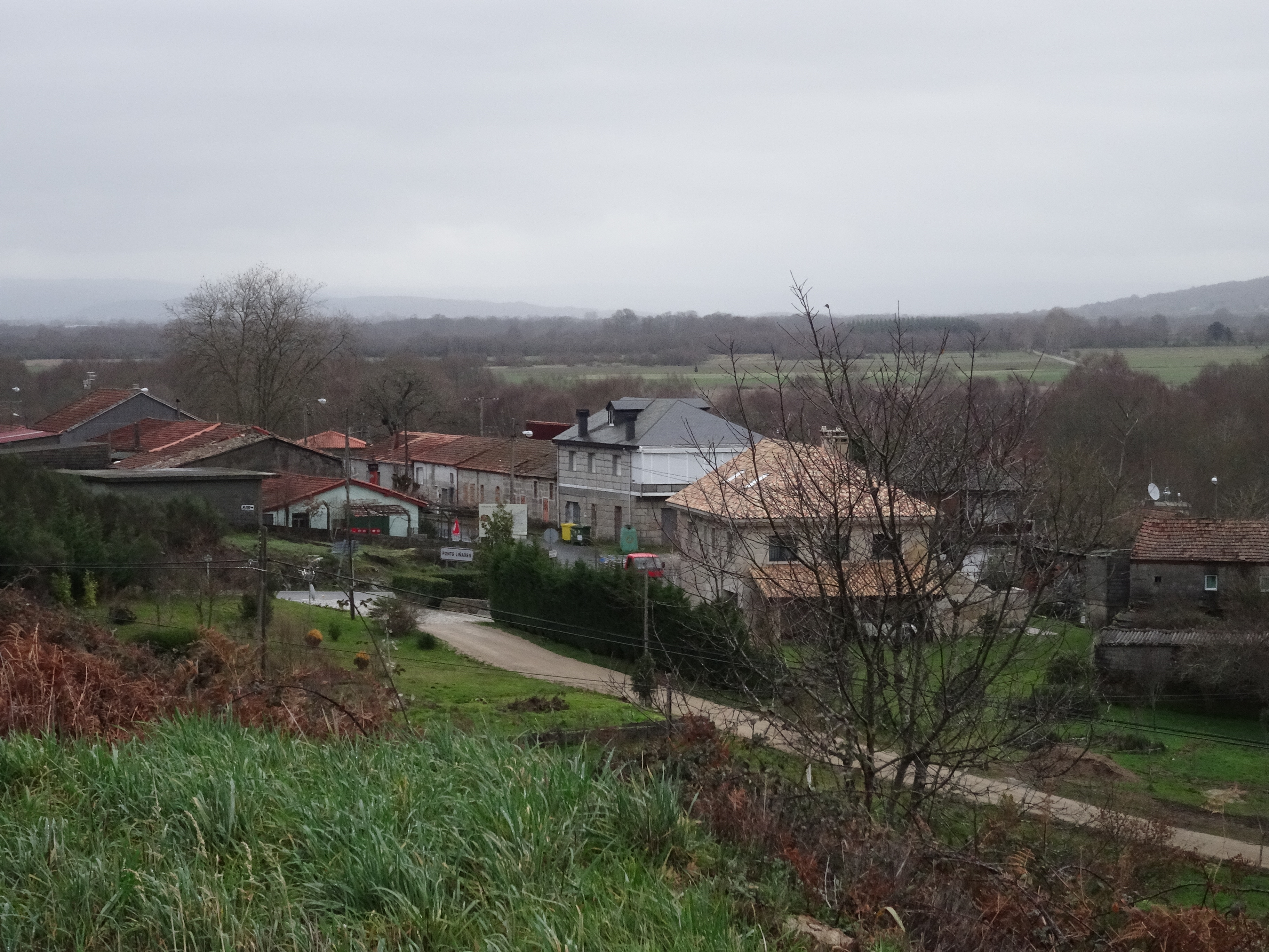 Lugar da Ponte Liñares na parroquia de Güín no concello de Bande, Ourense.